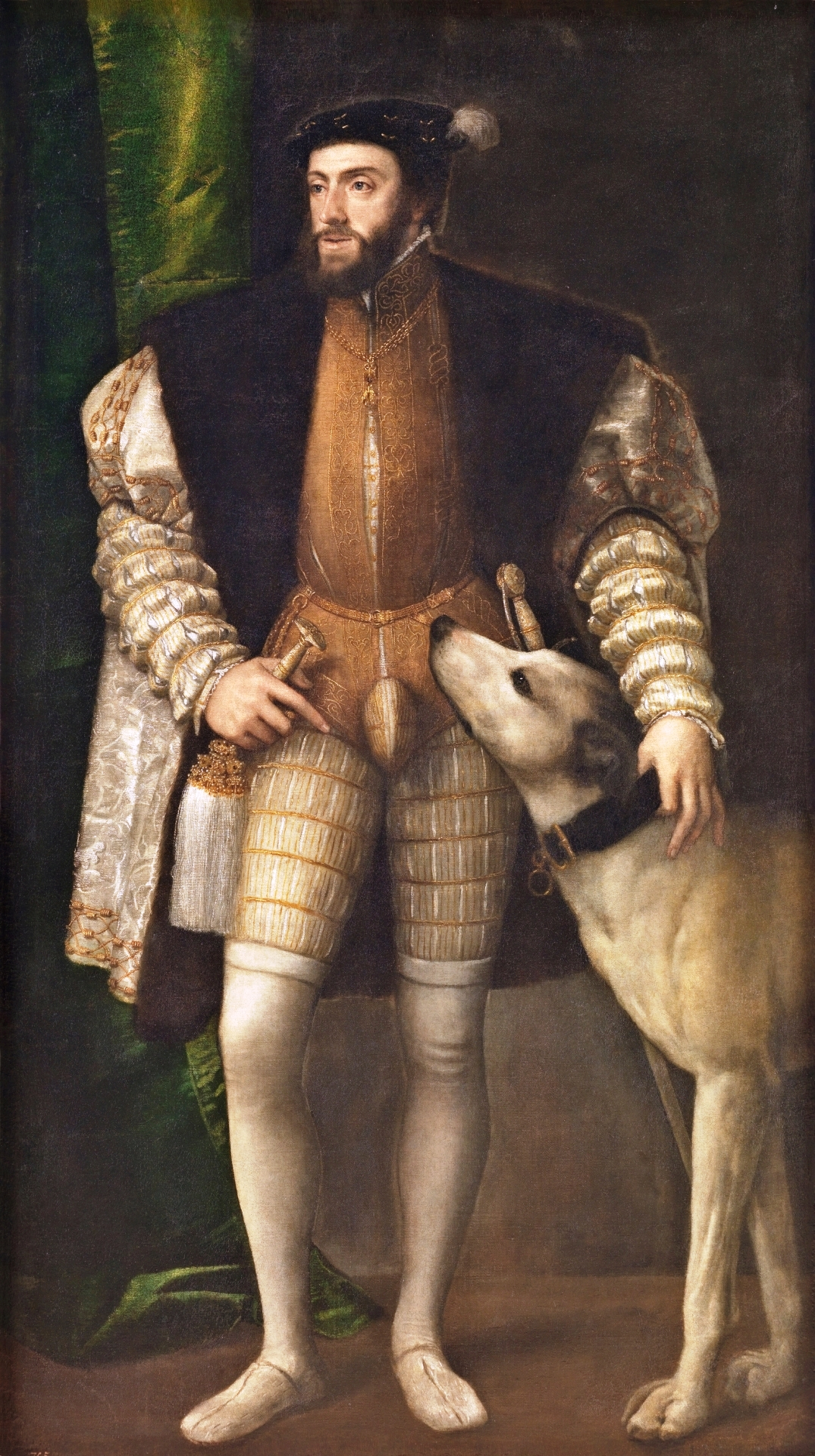 Retrato del emperador Carlos I de España (1500-1558), que aparece representado de cuerpo entero y junto a un perro.